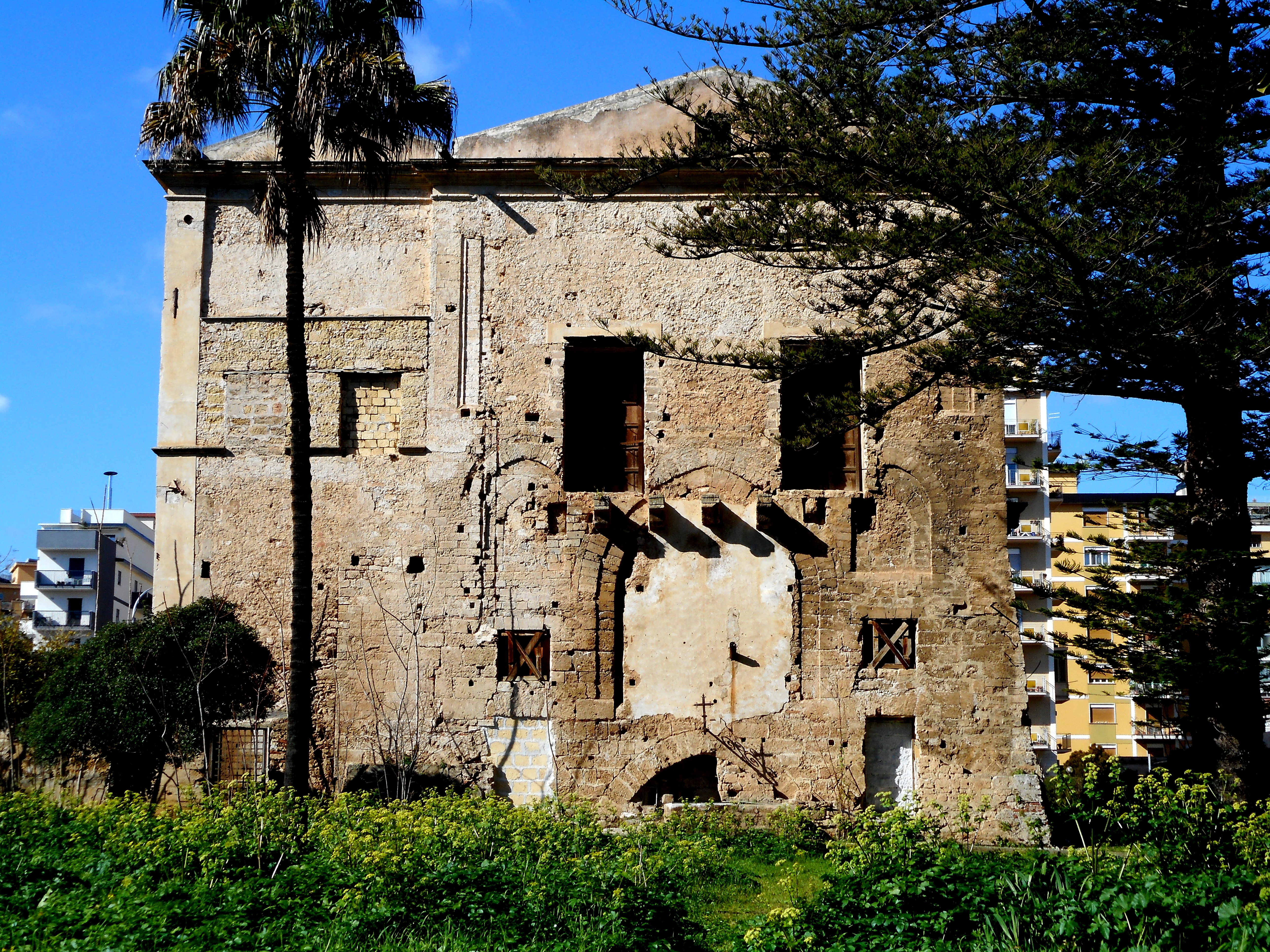 Resti della Cuba soprana inglobati in Villa Napoli